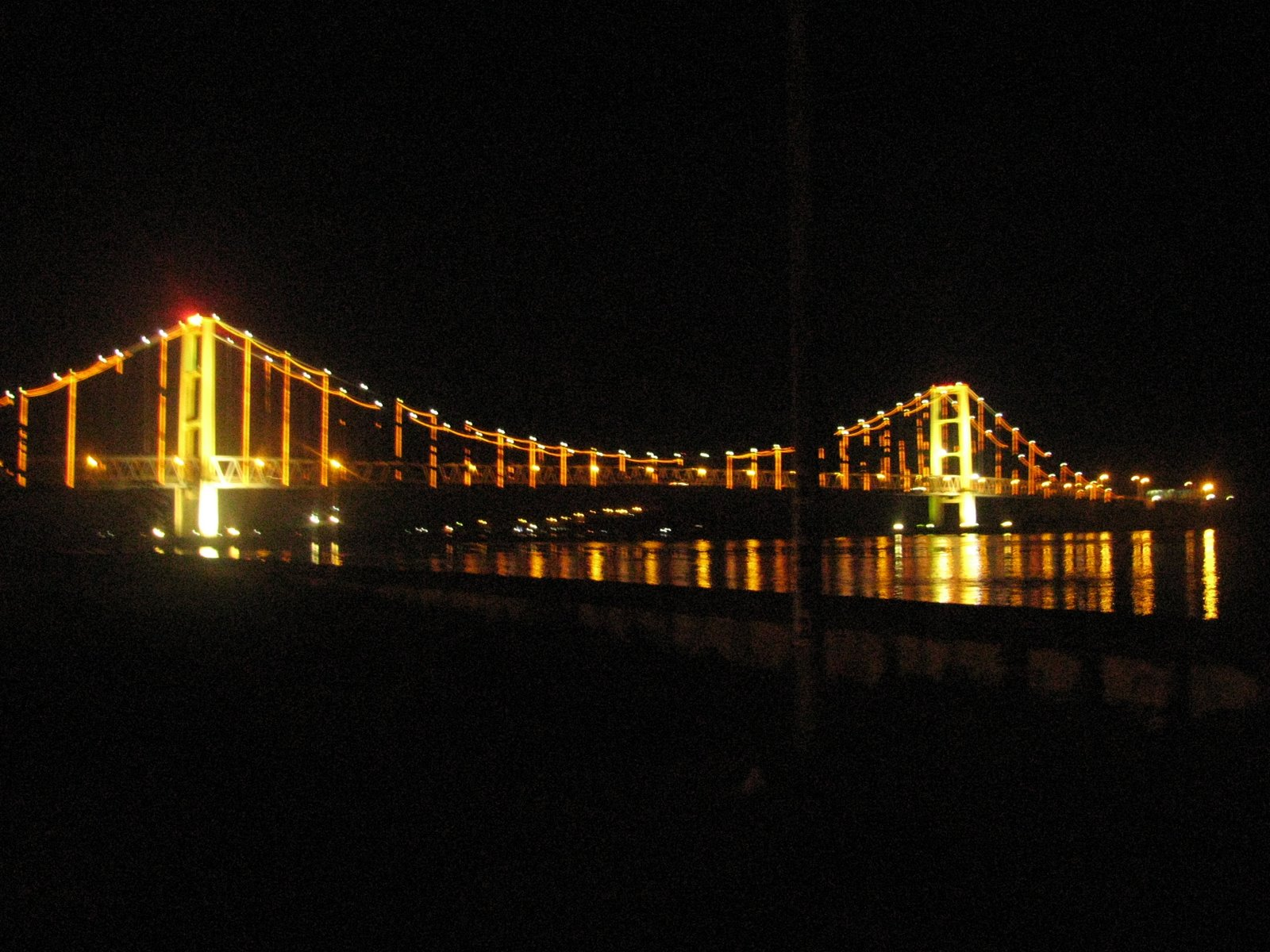 Bridge Kartanegara (Kukar Kaltim)